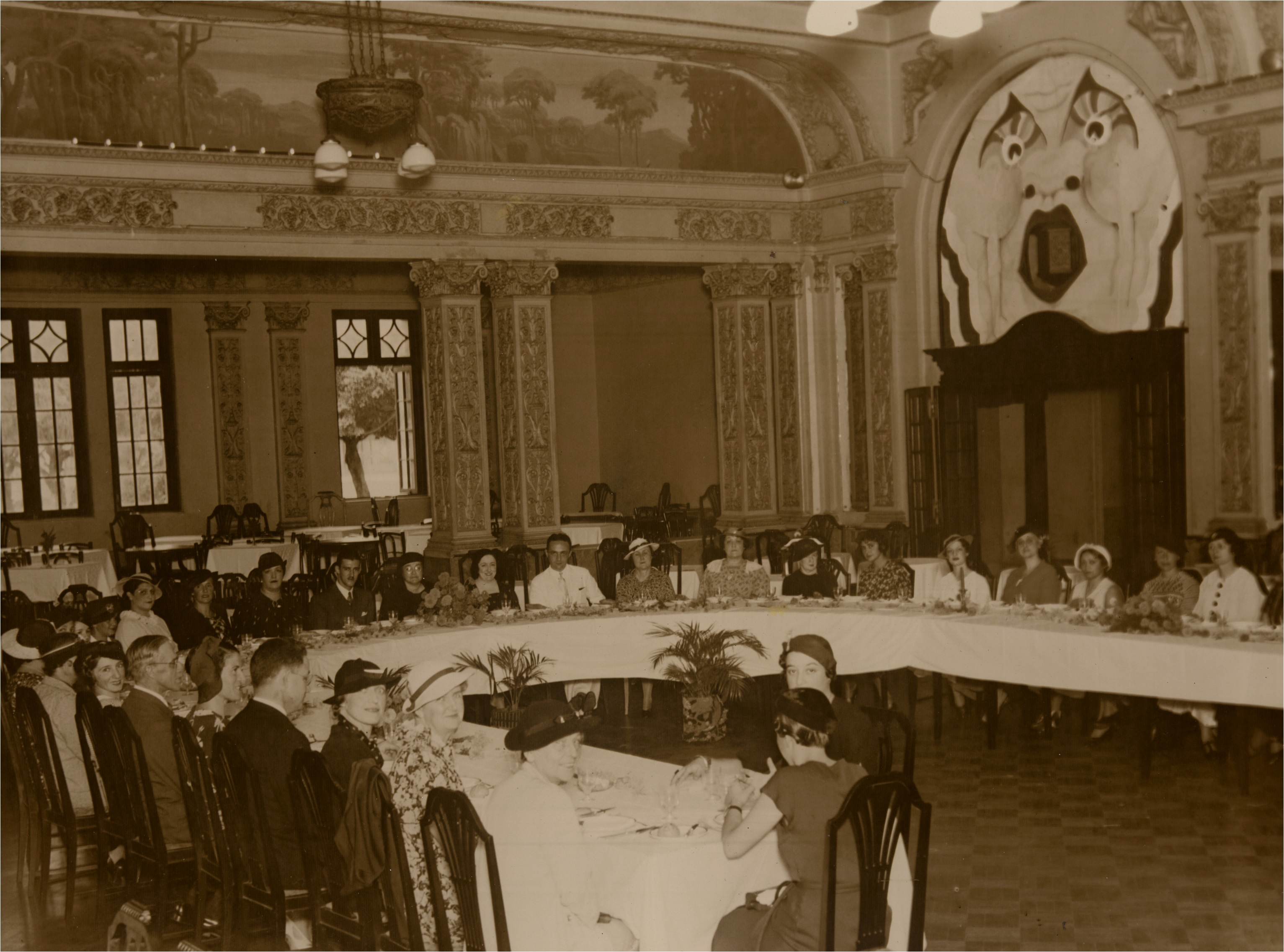 Almoço pan-americano organizado pela Federação Brasileira para o Progresso Feminino – FBPF. Fundo: Federação Brasileira pelo Progresso Feminino.